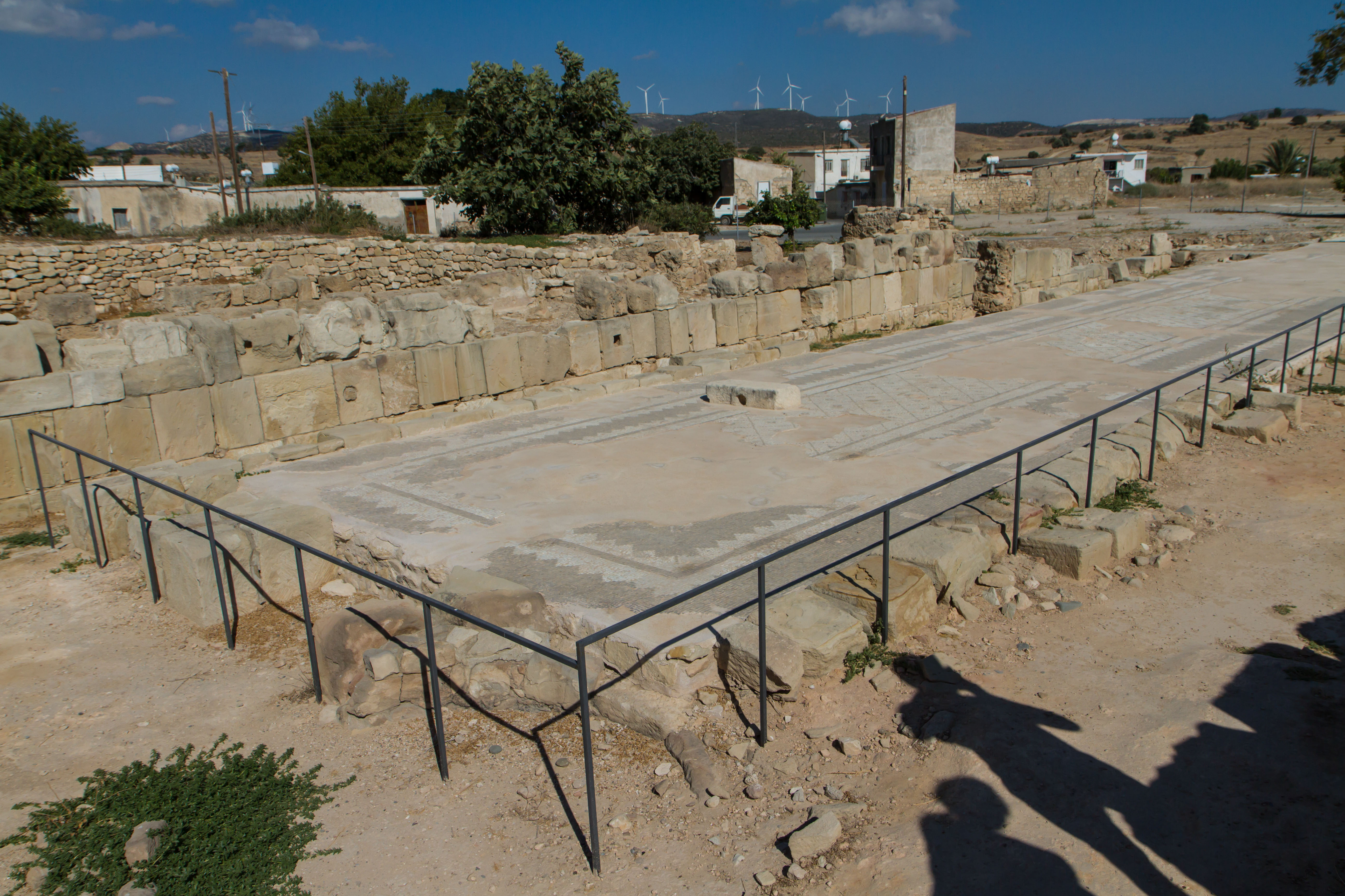 Kouklia, Cyprus